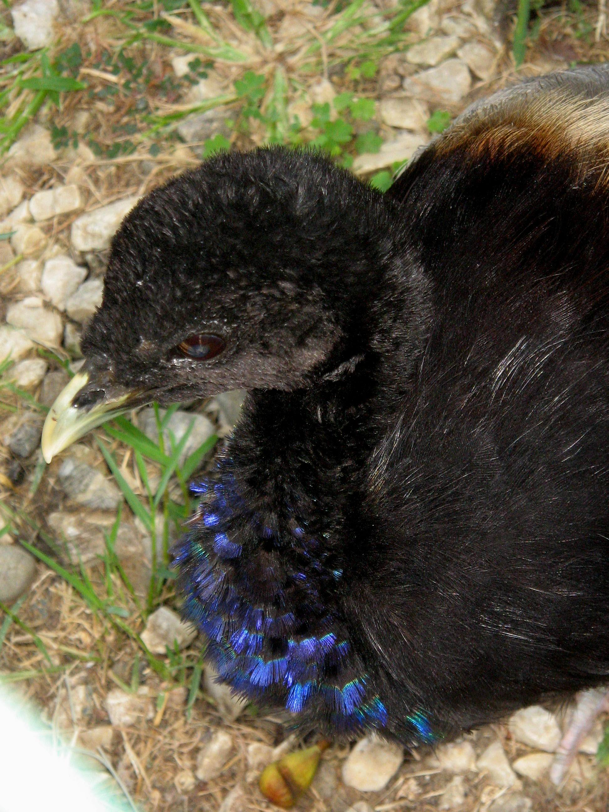 Uccello Trombettiere (Psophia leucoptera)